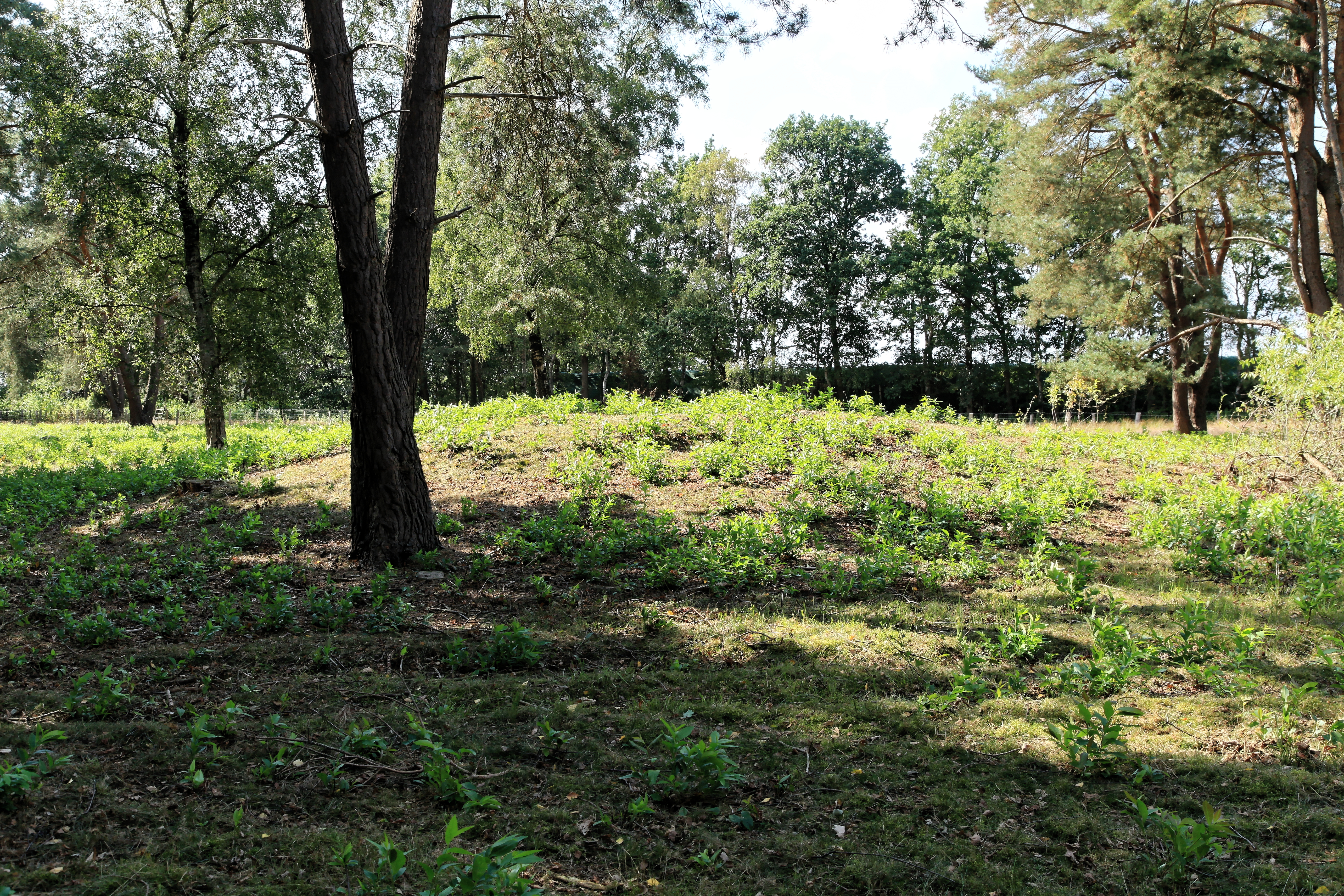 Grabhügelfeld am Wiesengrund, Hügelgräberheide am Wiesengrund, Am Wiesengrund in Groß Berßen